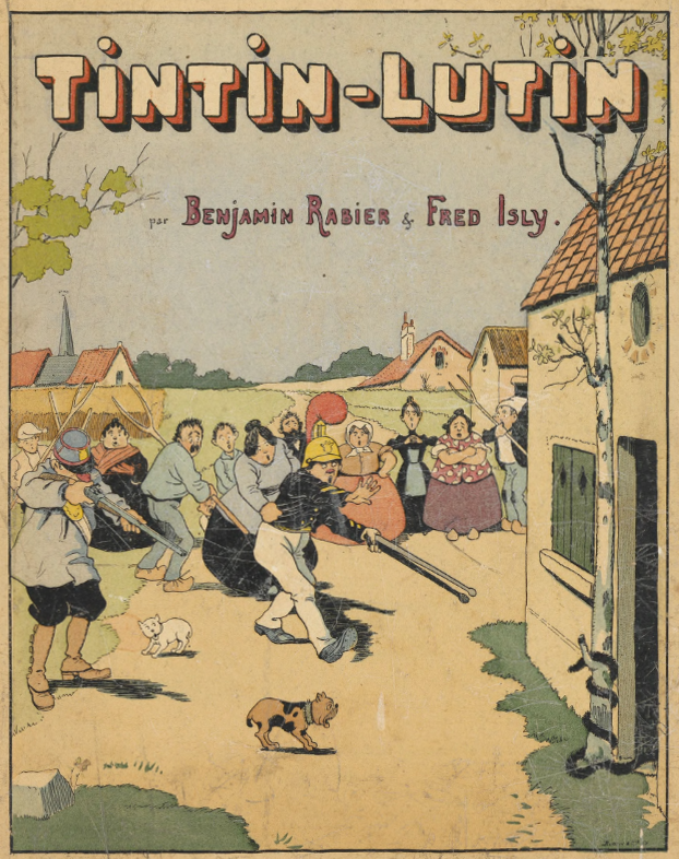 illustration du volume File:Rabier - Tintin-Lutin, 1898.djvu